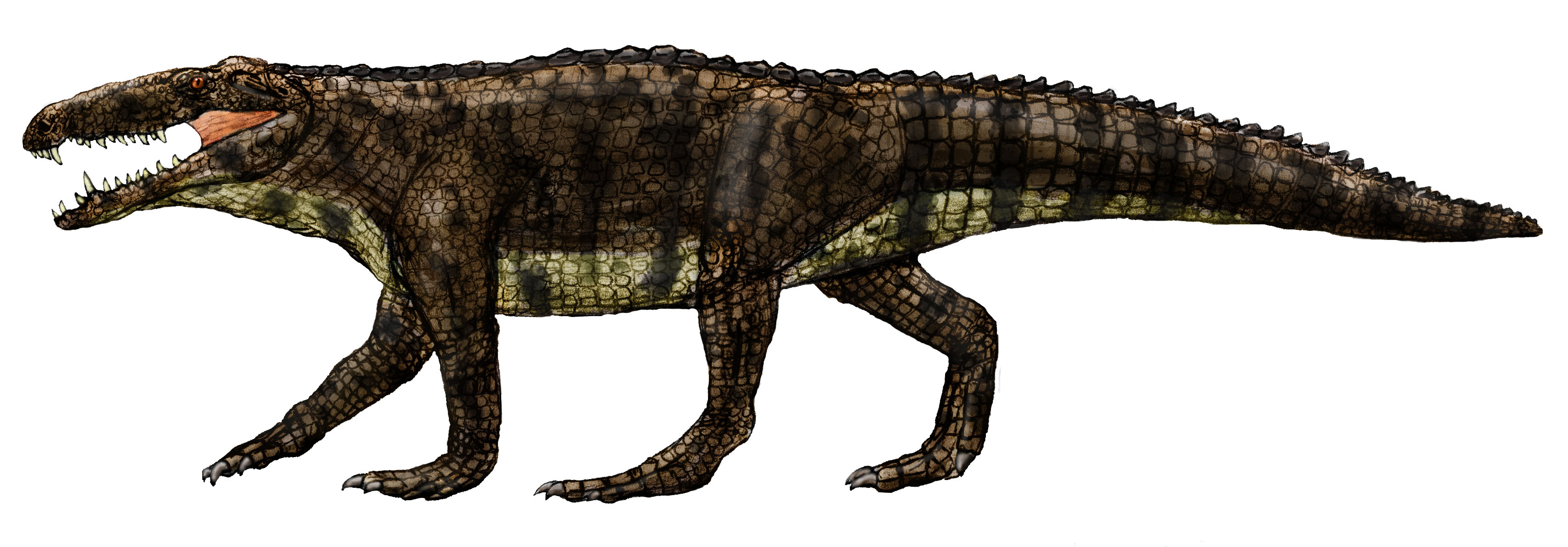 Recreación en vida del sebécido Langstonia huilensis, del Mioceno medio de Suramérica.